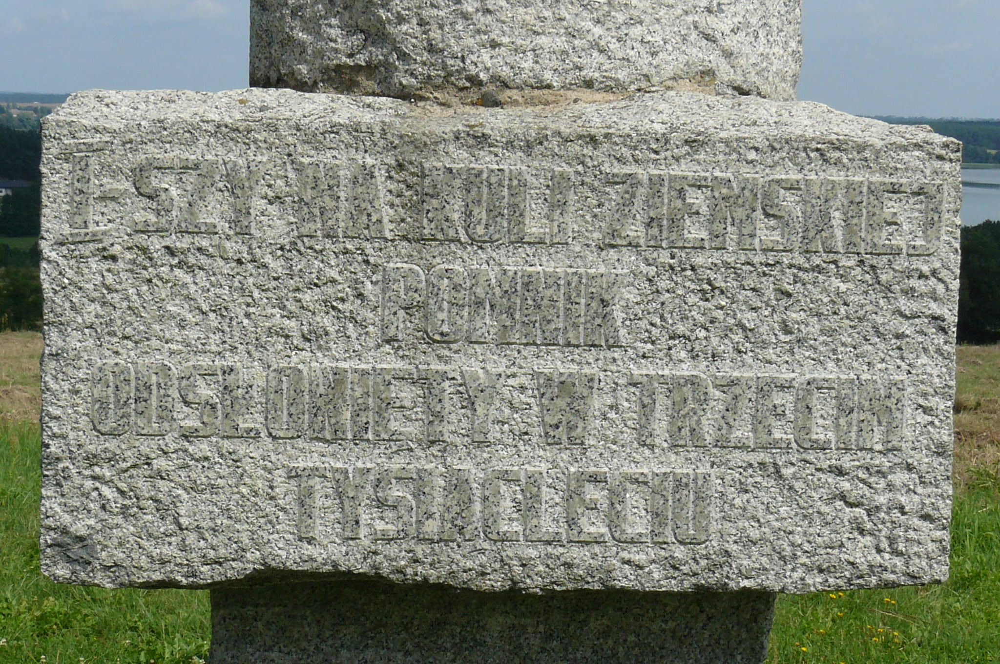 Pomnik w Łężeczkach, na punkcie widokowym.